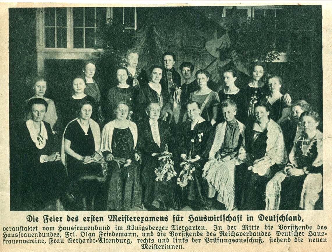 1914 wurde von Olga Friedemann und Helene Neumann der "Königsberger Hausfrauenbund", gegründet, der den Beruf der Hauswirtschaftleiterin einführte. Die für ganz Deutschland erste Prüfung zur staatlich anerkannten "Meisterin der Hauswirtschaft" fand 1926 in Königsberg statt. Die Abbildung zeigt die Absolventen der Prüfung als Beweis für die geschichtlichen Grundlagen